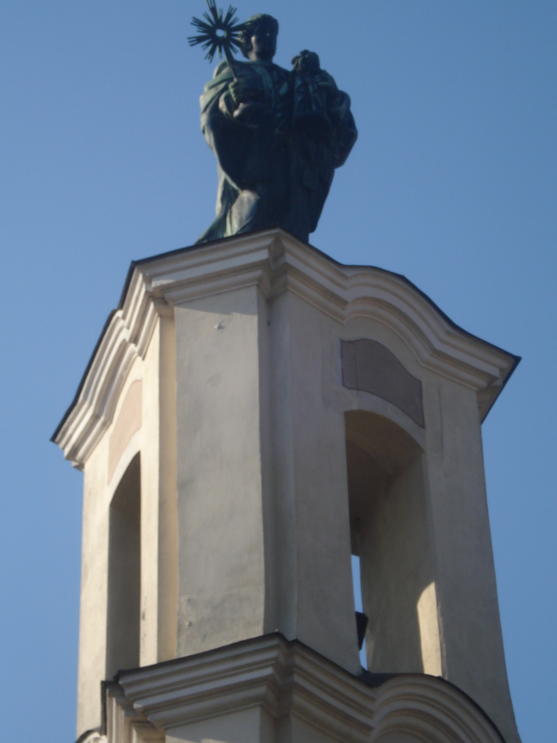 Chapel of St. Jacek (St. Hyacinthus) in Vilnius. Stone 1762; bronze sculpture by Bolesław Bałzukiewicz (1901)